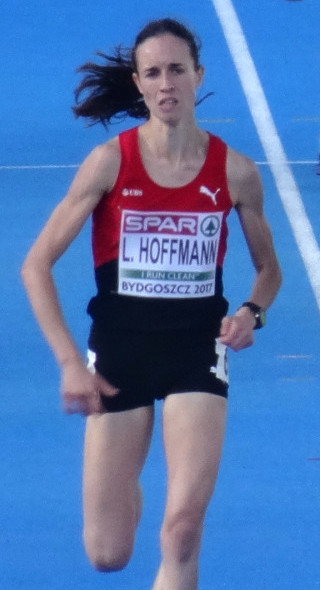 Młodzieżowe Mistrzostwa Europy w Lekkoatletyce U23 w Bydgoszczy 13-16 lipca 2017, kwalifikacje biegu na 800 m kobiet